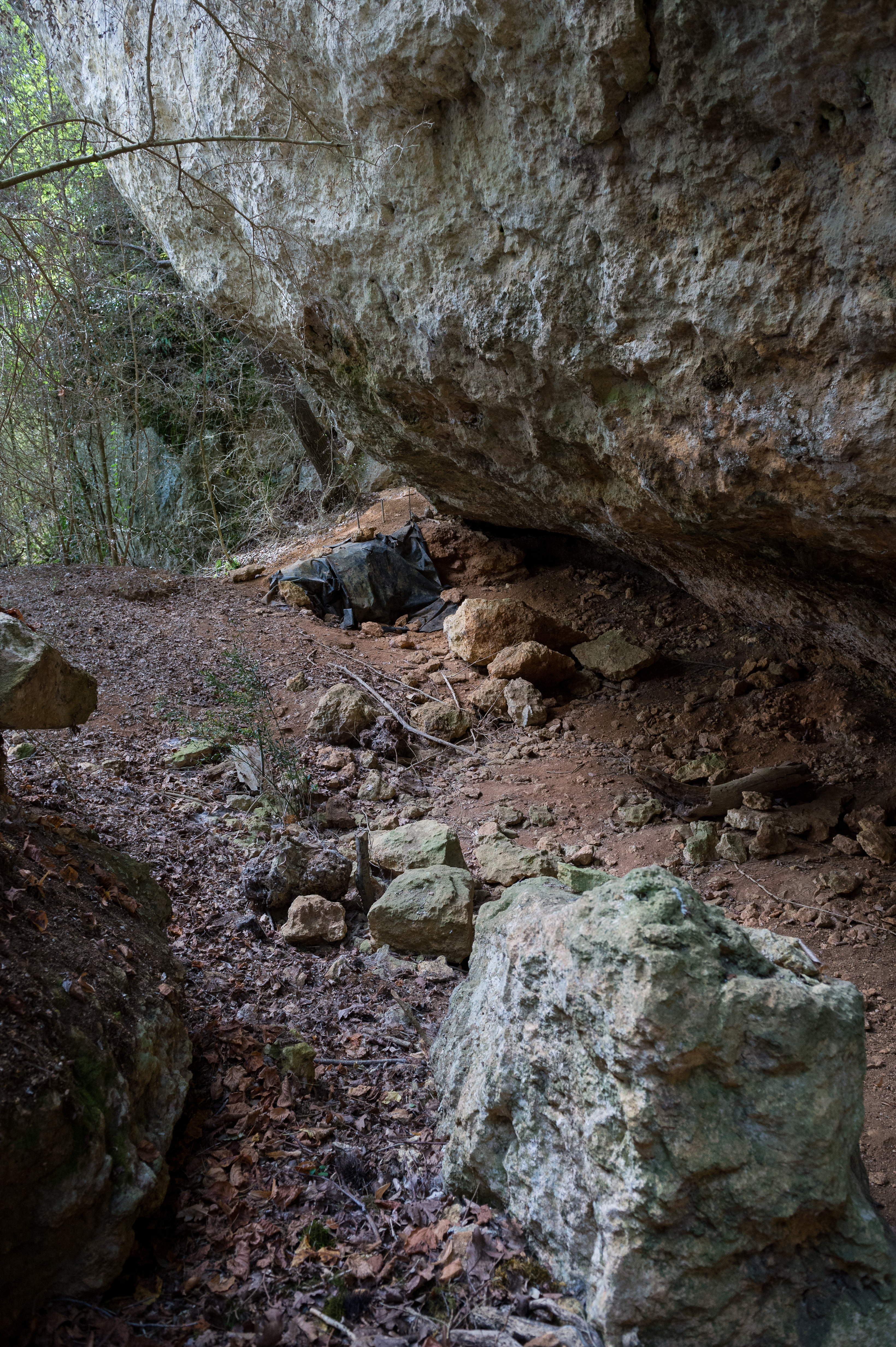 Der Abri de Villepin an der Vézère bei Tursac in Frankreich.